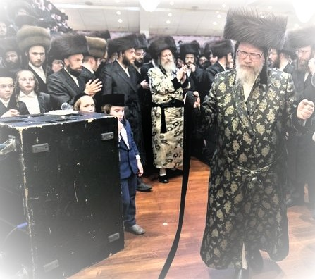 ייִדיש: האדמורים מבורשטין וגלאנטא